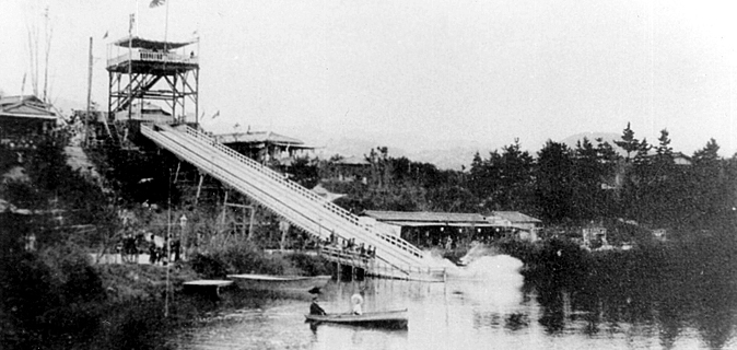 香櫨園遊園地ウォーターシュート（明治末～大正時代）